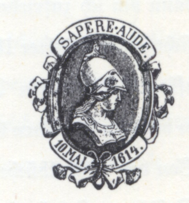 Verlagszeichen des Verlags Haude & Spener 1886